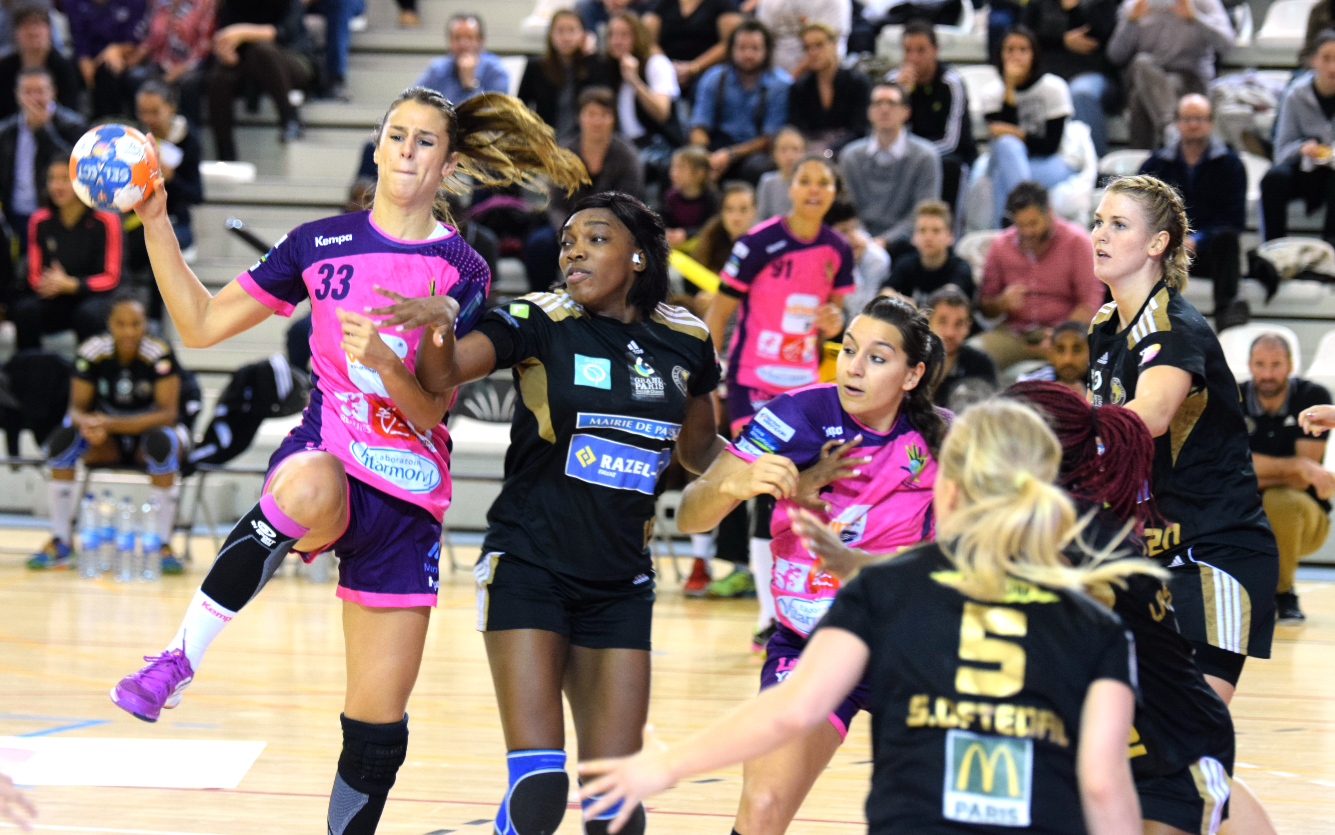 Beatriz Escribano Le 06 novembre 2015, lors du match Issy Paris Hand / Nantes LAHB comptant pour la 11e journée de LFH. Au stade Robert Carpentier à Issy-les-moulineaux.